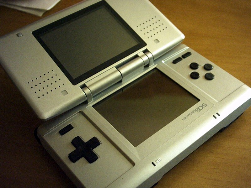 Siempre me gana este niño con sus increíbles gadgets